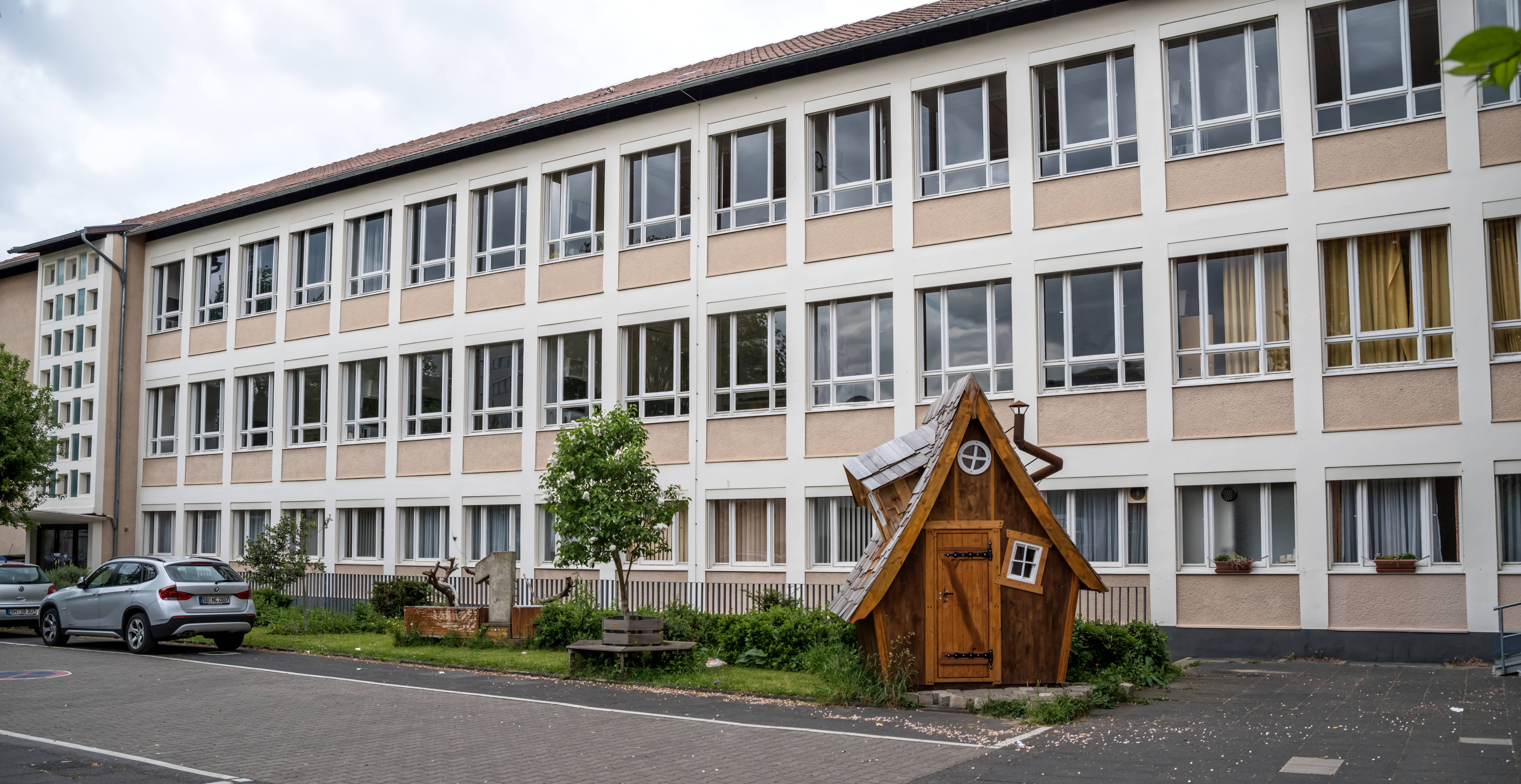 Bilder aus Bonn Das Ernst-Moritz-Arndt Gymnasium in der Endenicher Allee in Bonn-Poppelsdorf Der Neubau wurde am 12. Juni 1951 begonnen. Die ersten 12 Klassen wurden ab dem 3. November 1952 in neuen Räumen unterrichtet. Am 20. Februar 1953 wurde der gesamte Unterricht in den neuen Räumen gehalten. Die Einweihung war am 18. Juni 1953 Das Schulgebäude wurde 2006 unter Denkmalschutz gestellt, da es "charakteristisch ist für die Schularchitektur der Nachkriegszeit"